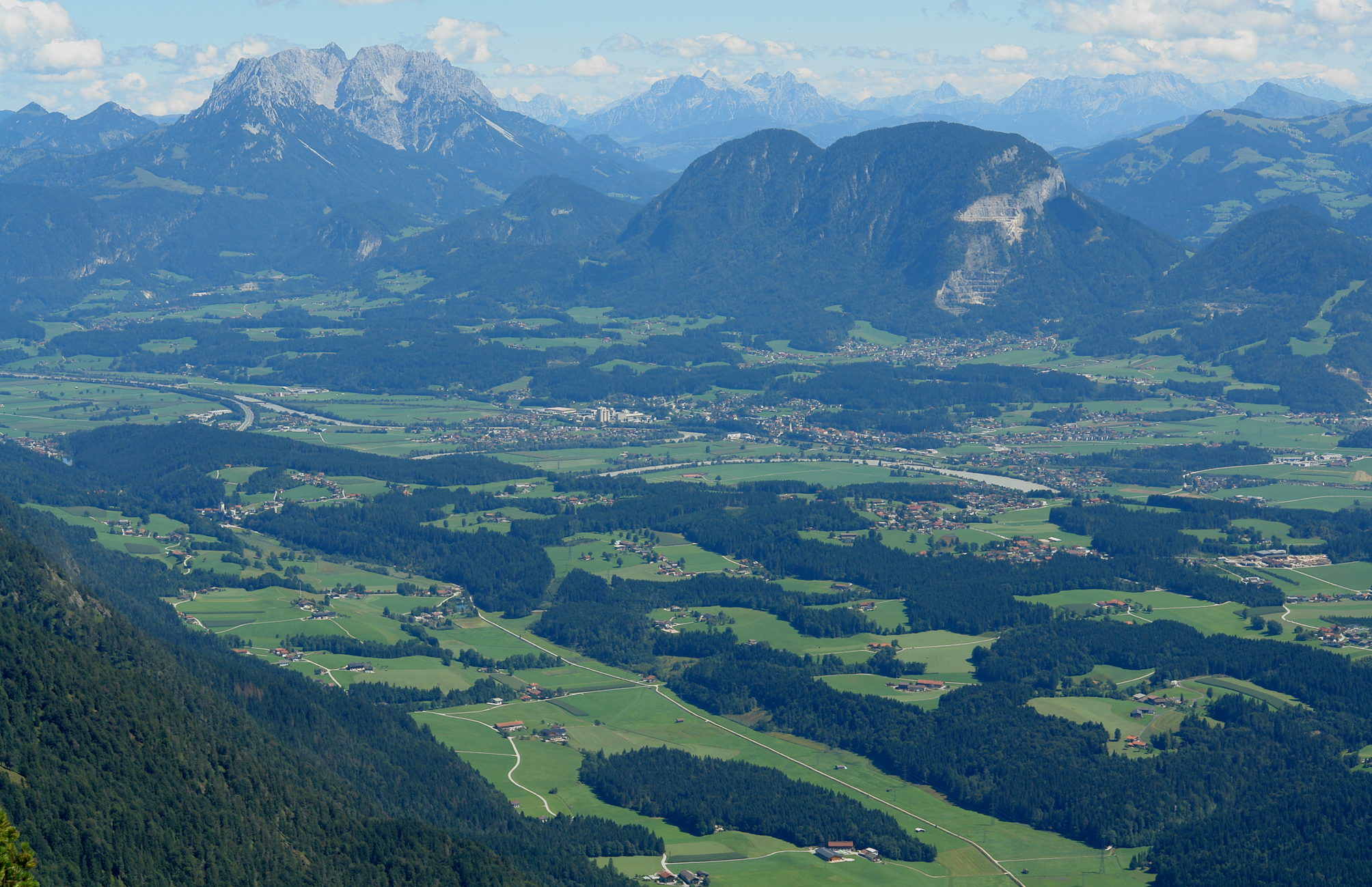 Blick vom Plessenberg auf das Unterland Richtung Osten, Kaisergebirge, Pölven, im Vordergrund Angerberg, links der Bildmitte Kirchbichl